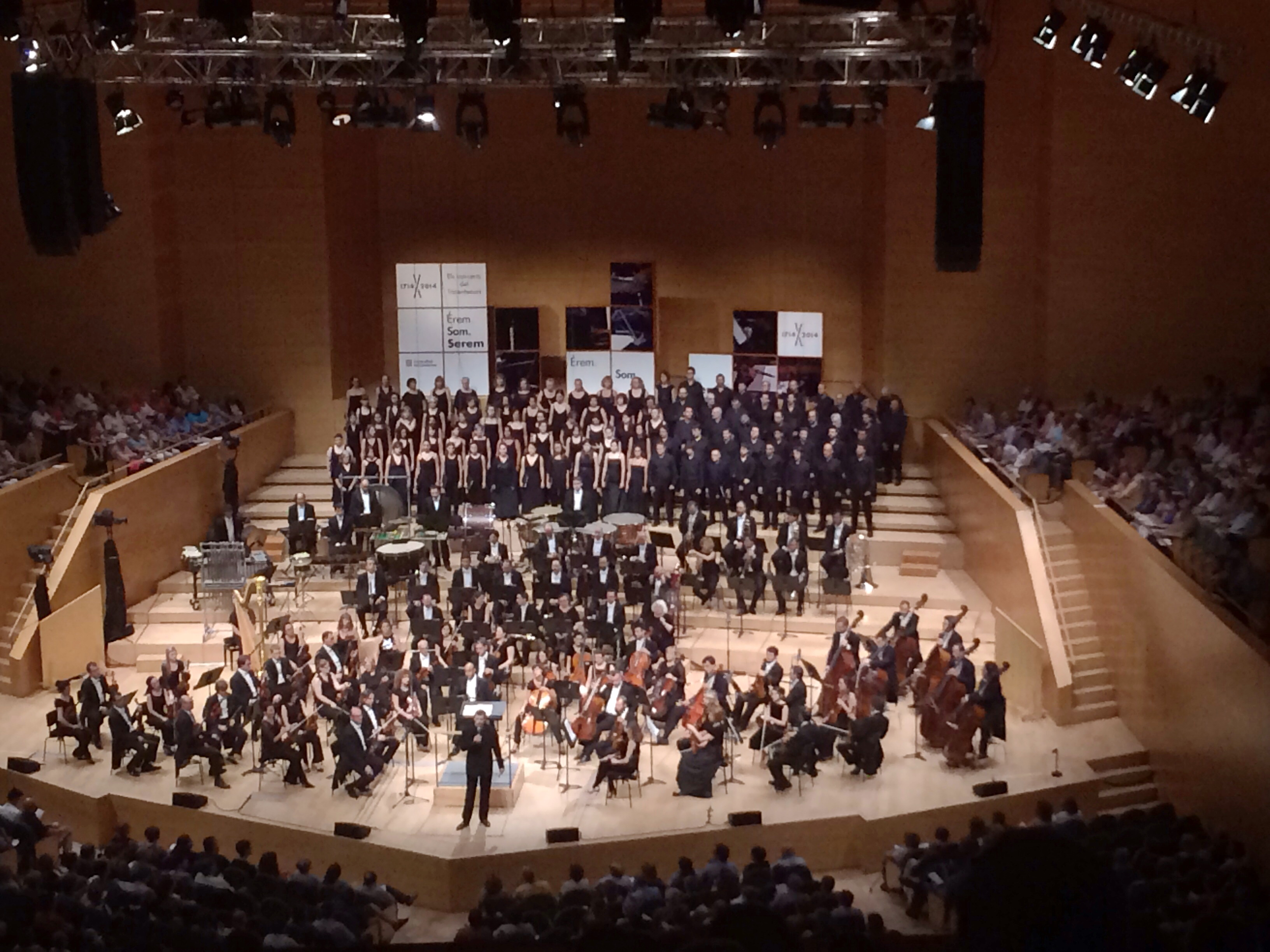 El director Salvador Brotons presentant la seva composició "Catalunya 1714" el dia de la seva estrena en versió simfònico-coral, al front de l'Orquestra Simfònica de Barcelona i Nacional de Catalunya, amb acompanyament de la Coral Càrmina, el Cor de Cambra de Granollers i el Cor Amics de la Unió. 19 de juliol de 2014 a la sala gran de l'Auditori de Barcelona